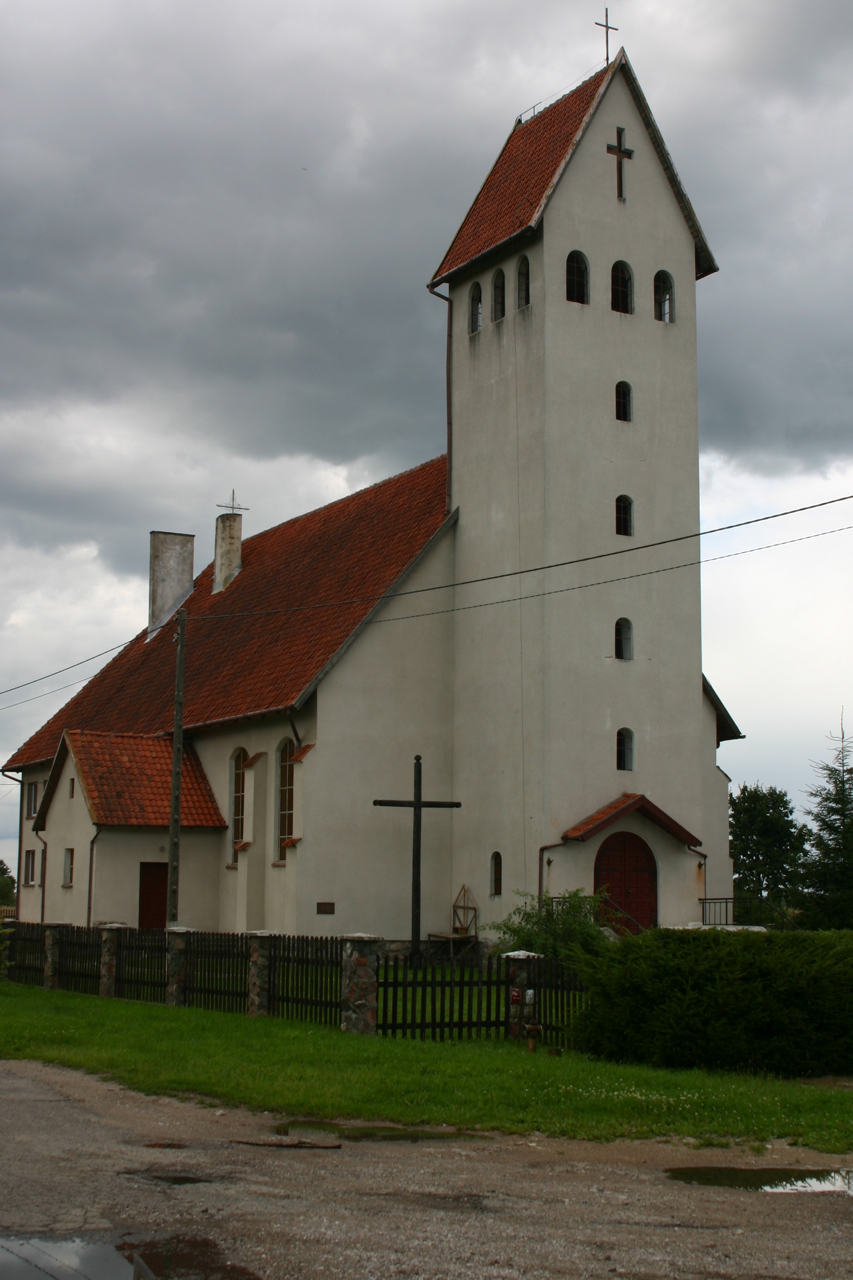 Skandawa - rzymskokatolicki kościół parafialny p.w. św. Wojciecha, 1983-1987